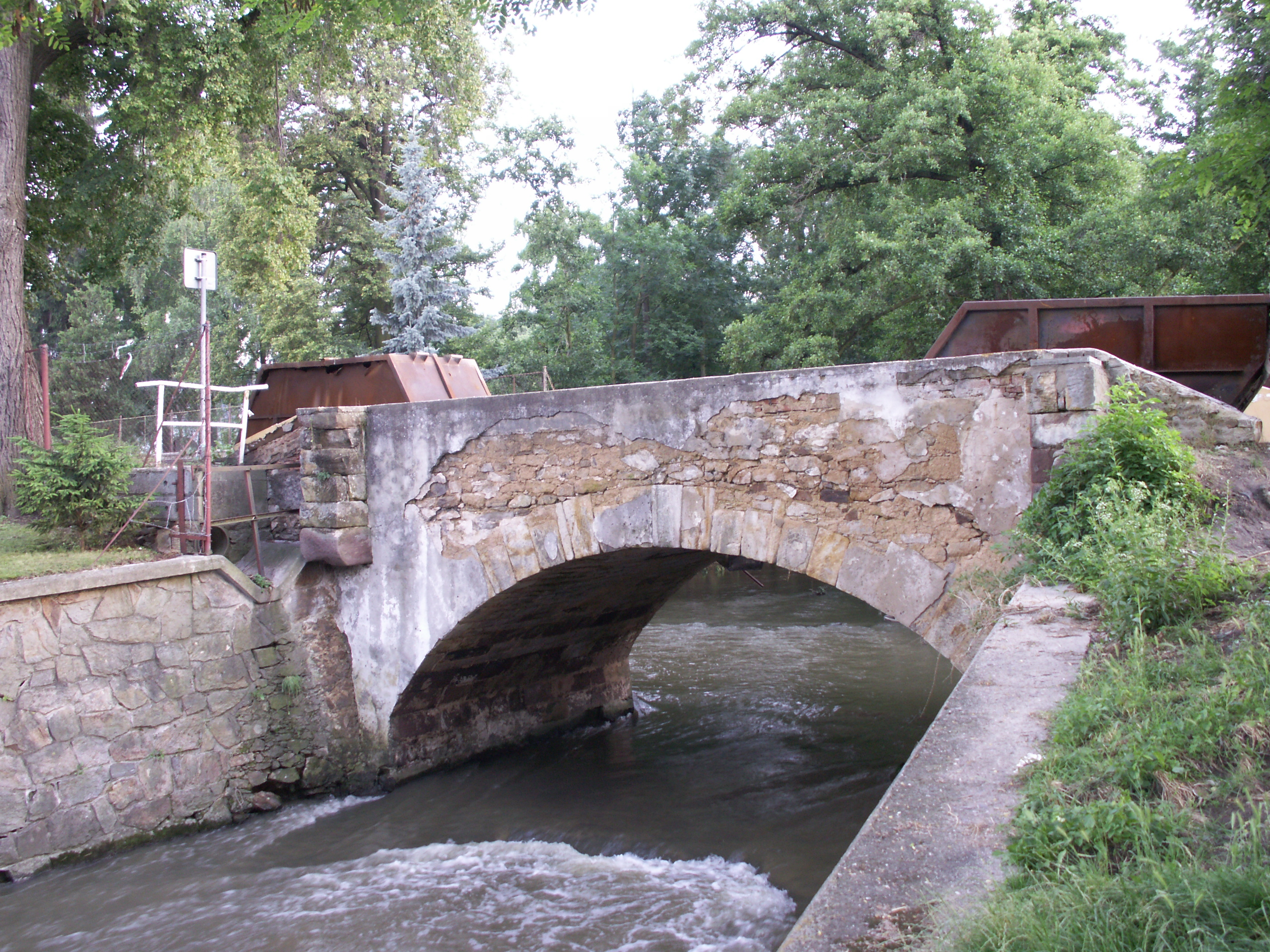 Radim, okres Kolín, barokní most přes Výrovku